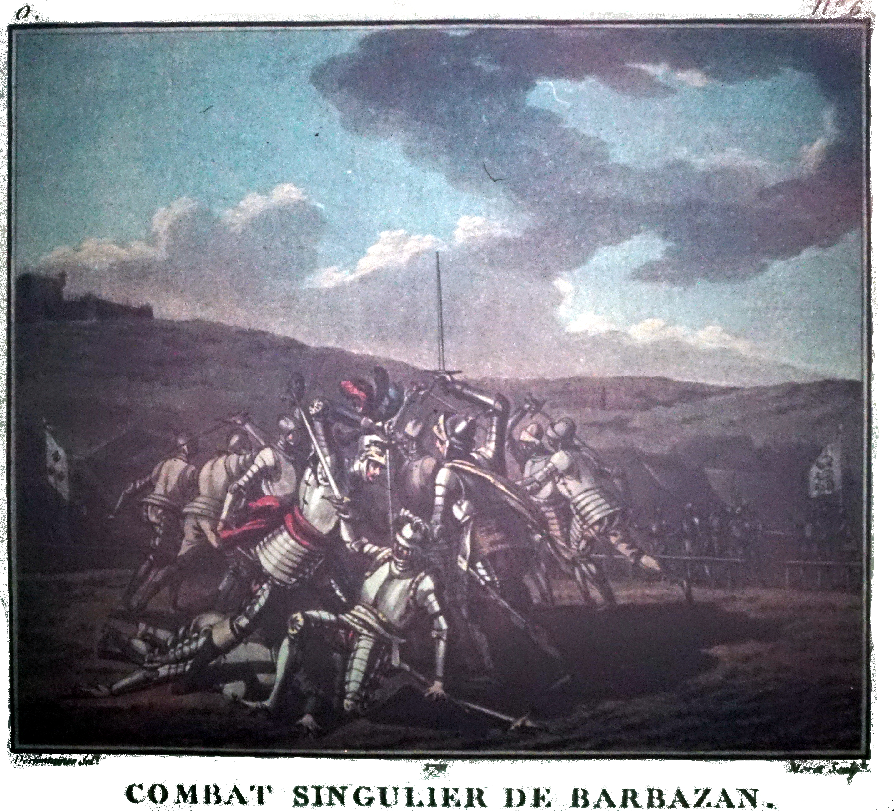 dessin du combat du chevalier de Barbazan près Chalons.